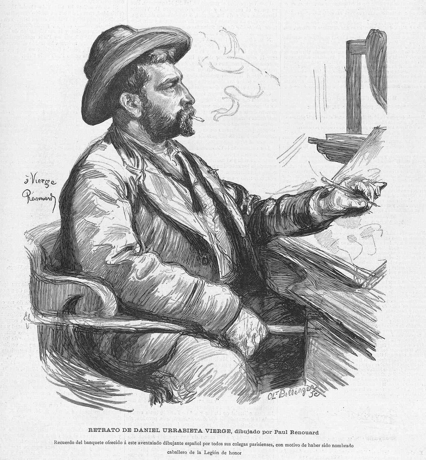 Retrato del pintor español Daniel Urrabieta Vierge, obra de Paul Renouard, en la revista La Ilustración Artística.